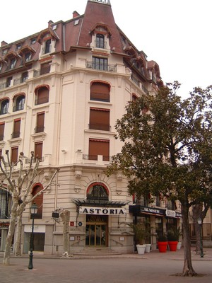 L'Hôtel palace l'Astoria dans la ville d'Aix-les-Bains en France dans le département de la savoie. Ce batiment est de style art nouveau.